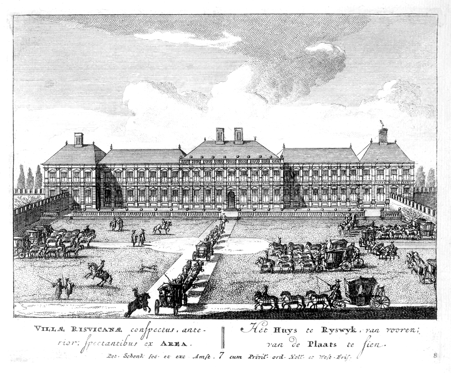 Huis ter Nieuburch in Rijswijk